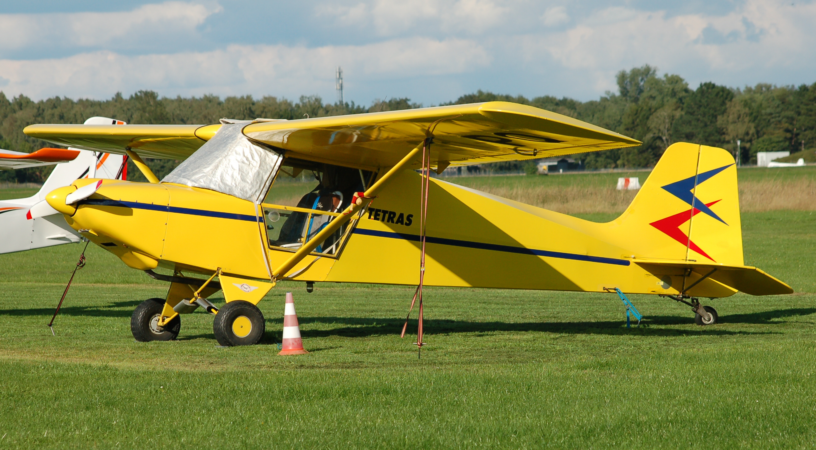 Eine französische Humbert Aviation - Tetras ohne Kennung auf dem Flugplatz Uetersen